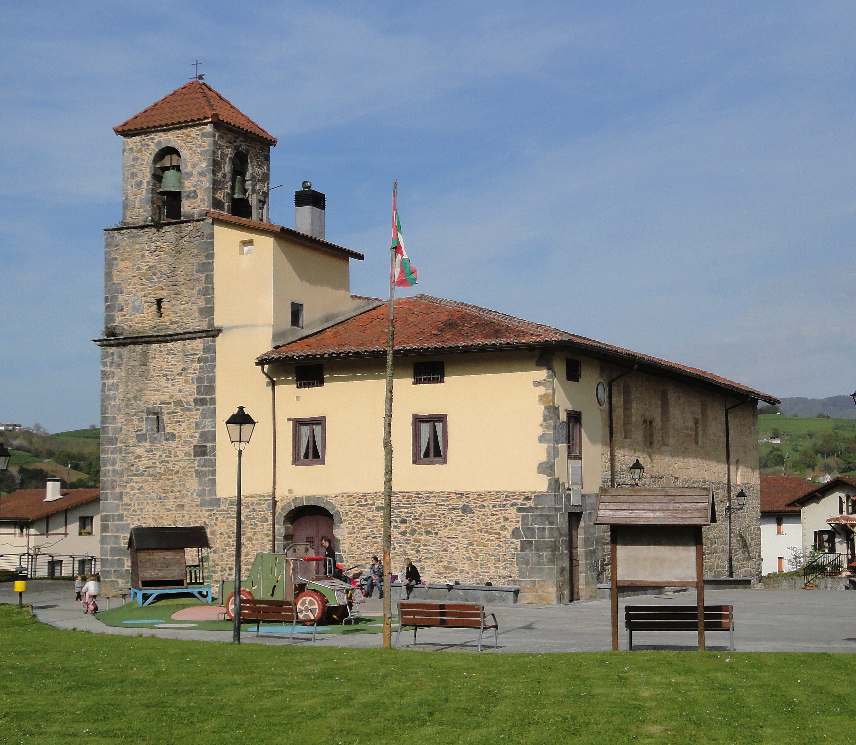 Andra Mari Zeruratzearen Eliza - Baliarrain